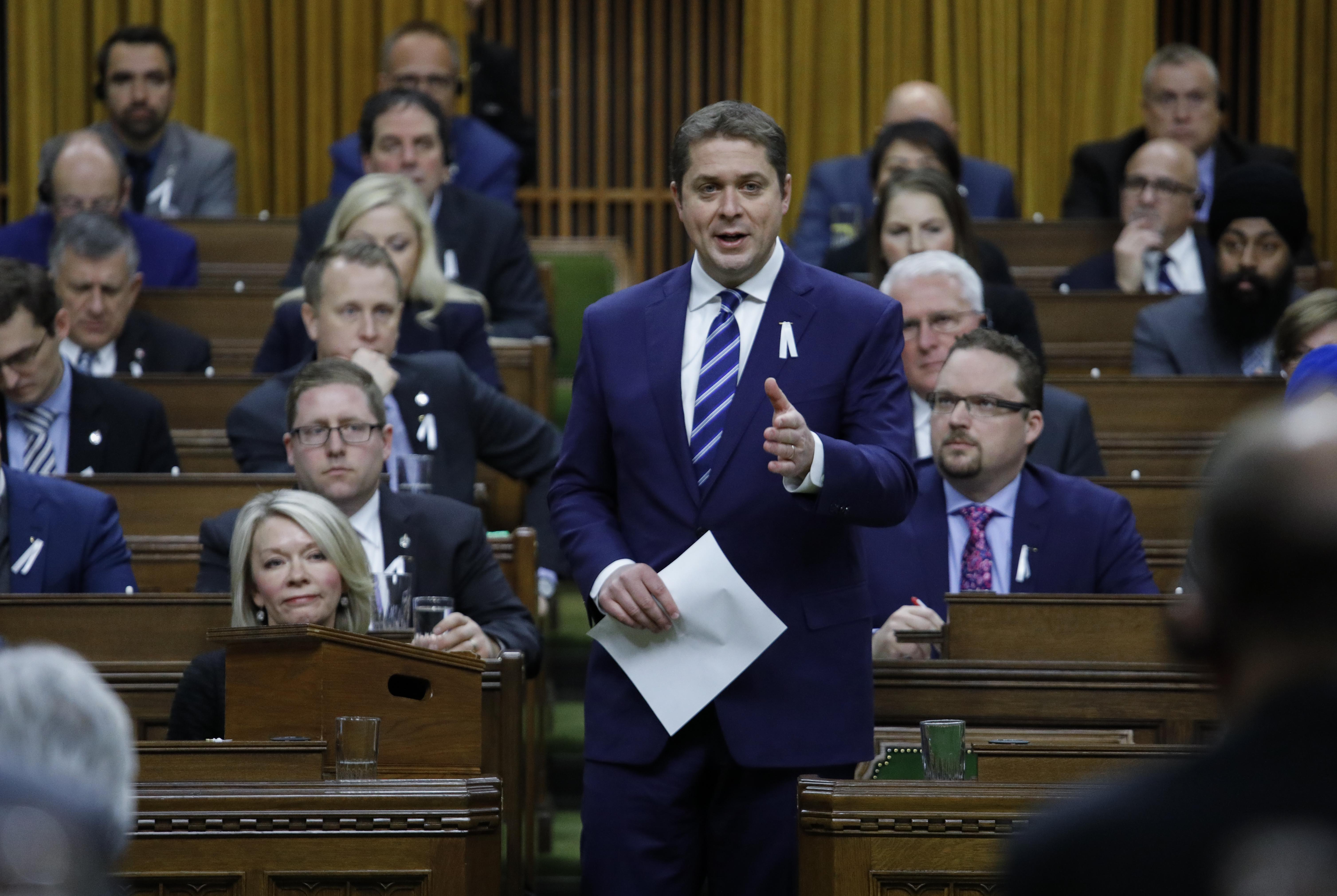 Question Period is back! I am disappointed Justin Trudeau’s throne speech didn’t prioritize a strong and united Canada. But I’m here to assure Canadians that Conservatives will be here fighting every day with everything we have. La période de questions recommence ! Je suis déçu par le discours du Trône de Justin Trudeau et par le fait qu’il n’ait pas mis l’accent sur un Canada puissant et uni. Mais, je suis ici pour assurer aux Canadiens que les conservateurs sont ici pour se battre pour eux, sans relâche, de toutes nos forces.